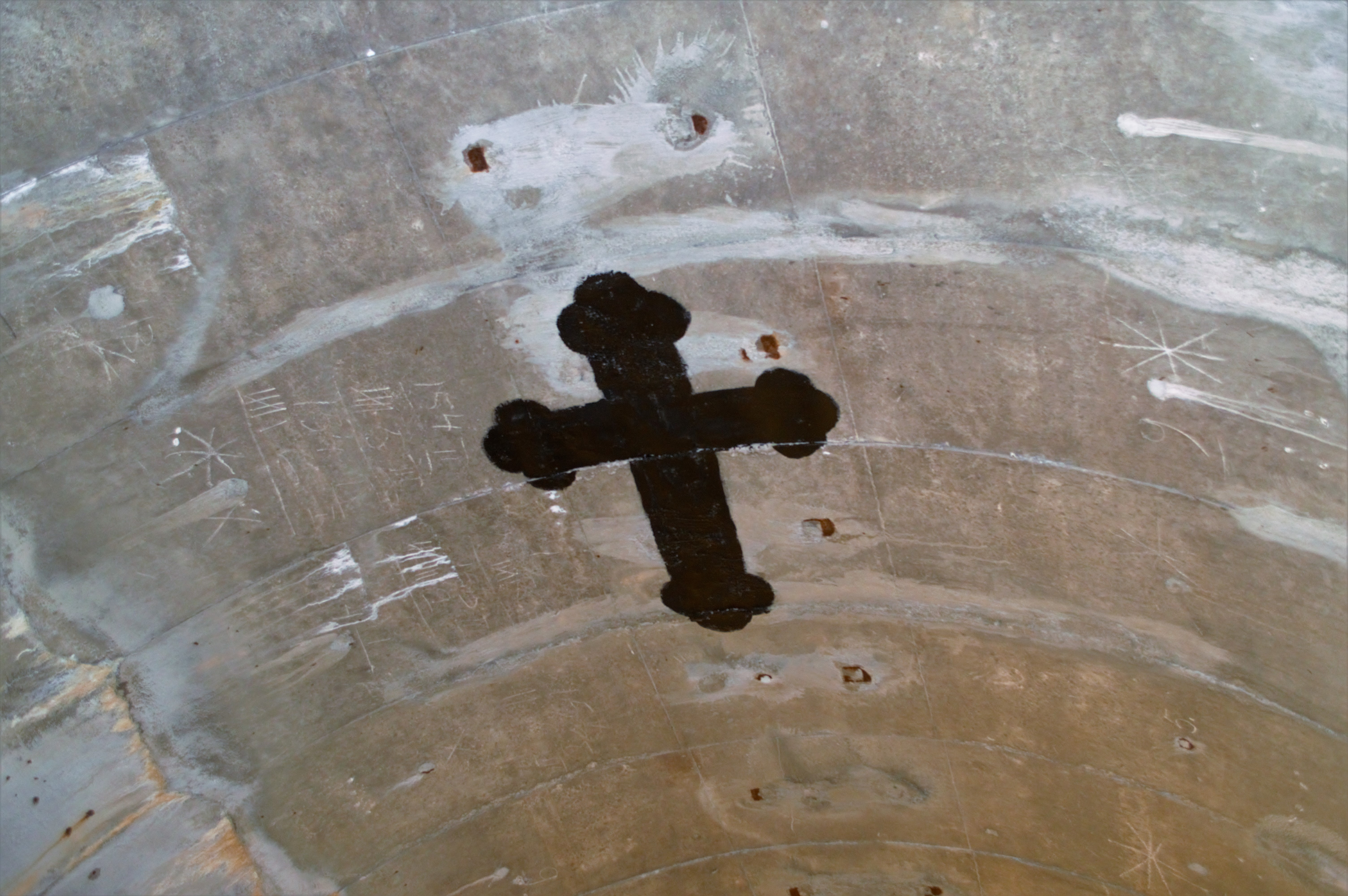 Pispalan uittotunnelissa oleva risti Pispalan vanhan kirkon paikasta